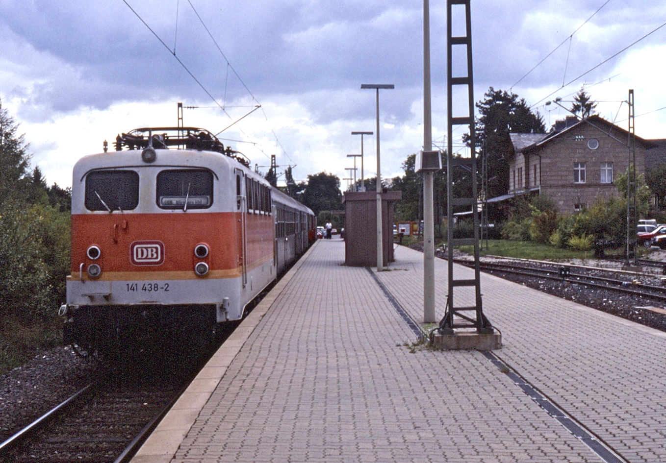 Deutsche Bundesbahn 141.438 on a push-pull set at Altdorf (b Nürnberg) on 23 September 1991 prior to working train 4448, 11:54 Altdorf (b Nürnberg) to Feucht.